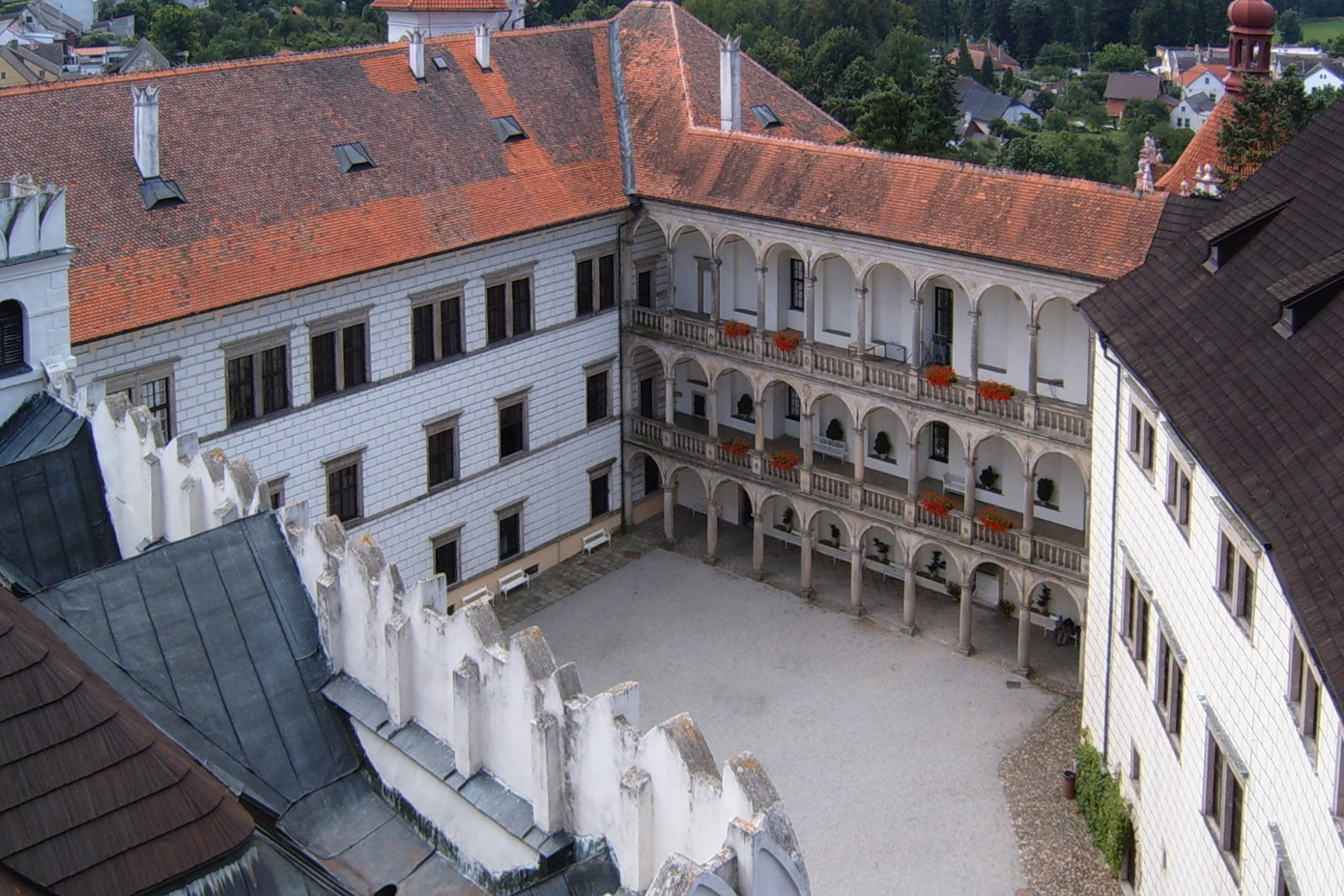 Zámek Jindřichův Hradec – vnitřní nádvoří s Velkými arkádami